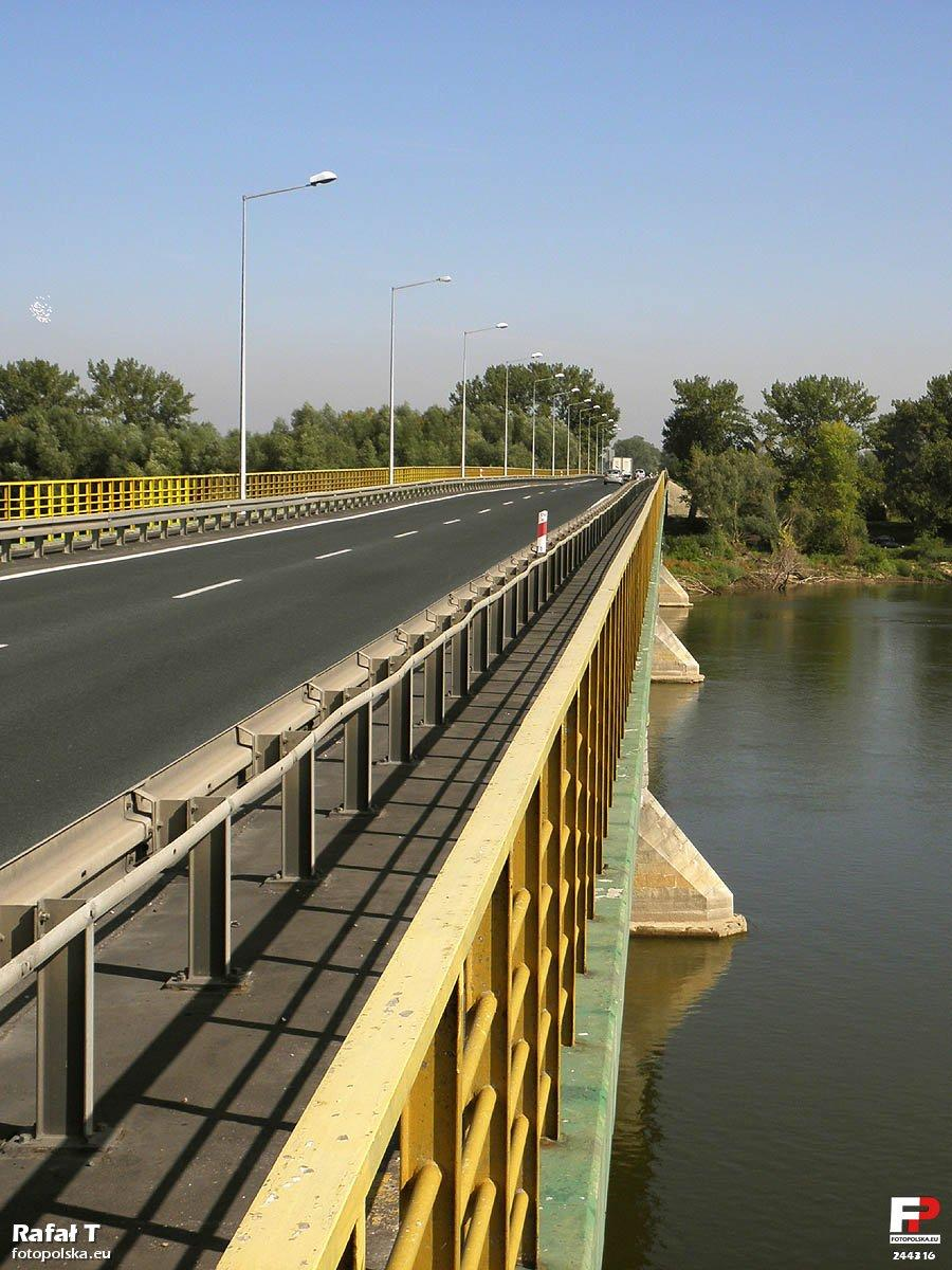 Most drogowy na Wiśle.